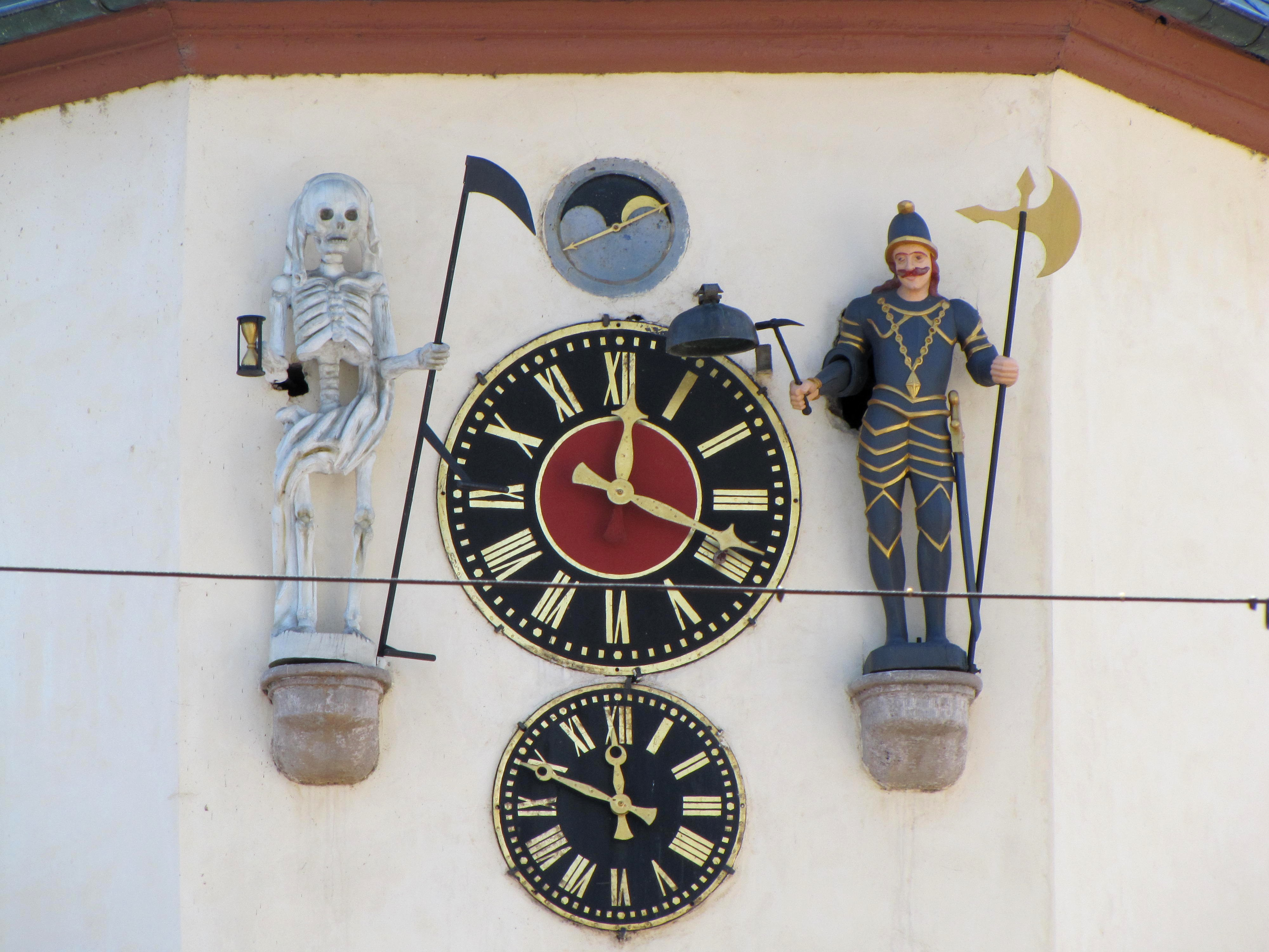 Alsace, Bas-Rhin, Benfeld, Hôtel de Ville (1619), place de la Mairie (PA00084605, IA00023505). Jacquemart (vers 1619), horloge J.B.Schwilgué (1859)